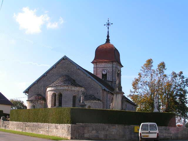 Chevet roman du XII° siècle; le reste de l'église est daté de 1790.